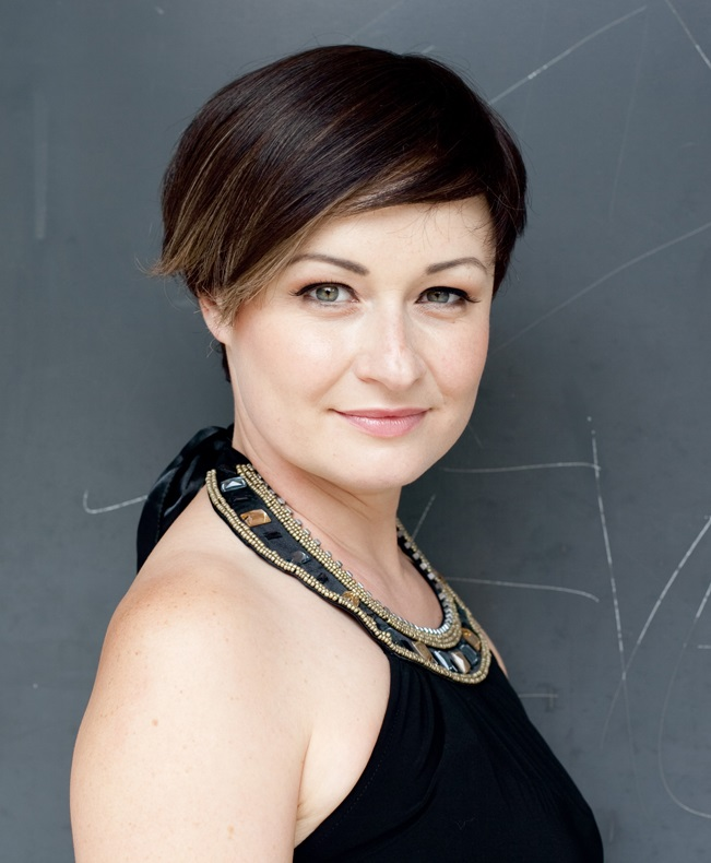 Anja Nina Bahrmann, Ausschnitt aus File:Anja Nina Bahrmann.jpg